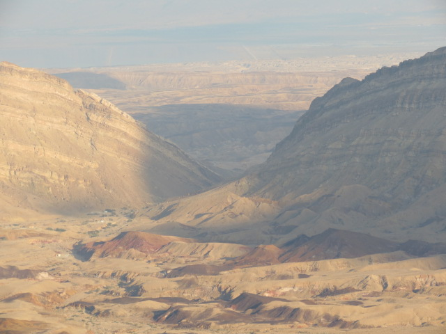 HaMakhtesh HaGadol